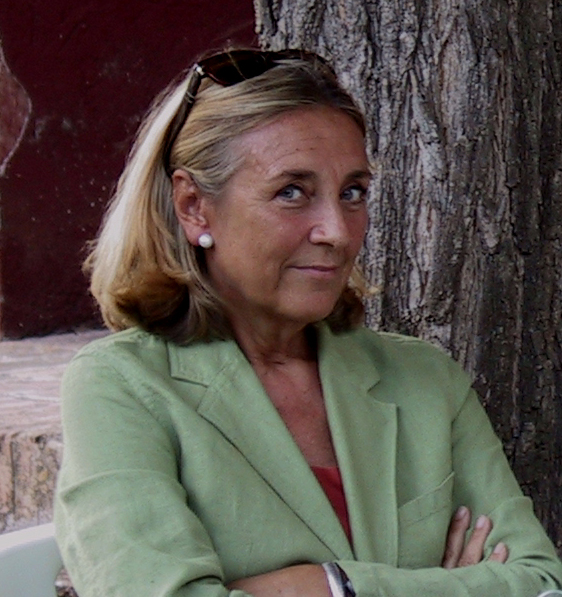 Ritratto di Valeria Della Valle